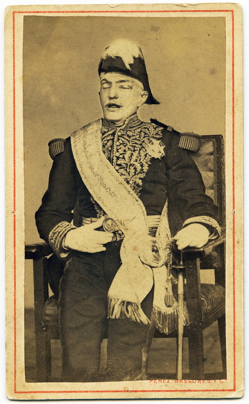 Gabriel García Moreno, (Guayaquil, 24 de diciembre de 1821 - Quito, 6 de agosto de 1875), fue un estadista, abogado, político y escritor ecuatoriano, dos veces presidente constitucional de Ecuador. Los restos embalsamados de García Moreno, vestido con su uniforme de general y luciendo la Banda Presidencial fueron expuestos en el altar mayor de la Catedral. El presidente asesinado lucía un bicornio con plumas blancas y varias condecoraciones en el pecho. Una foto de la época muestra los ojos hinchados y la boca entrecerrada del cadáver, sentado en una silla al pie de la cual se puede ver su espada. Antes de morir, el presidente había promulgado el Código Militar, que establece los detalles del funeral del presidente muerto en ejercicio. Probablemente se siguieron estas disposiciones en su funeral de Estado.